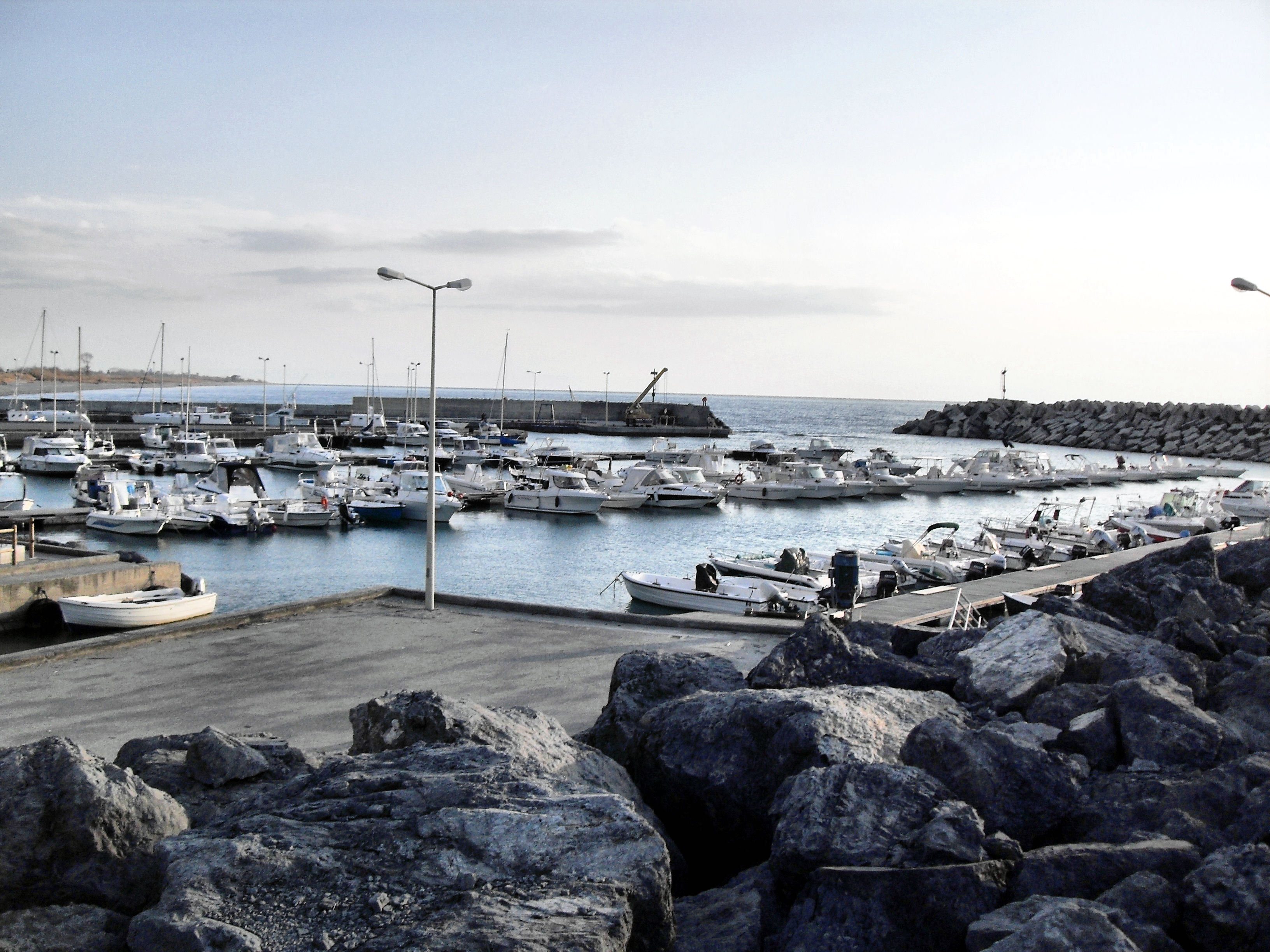 Io sottoscritto Luigi Salvatore Vadacchino, utente di Wikipedia sotto il nome di Lodewijk Vadacchino, cedo l'immagine SDC11481.jpg a Wikimedia Italia, sotto licenza CC-BY-SA, con il nome Campora_San_Giovanni_Gennaio_2010_-_Porto.jpg. L'Immagine fotografica raffigurante il Porto Turistico della mia cittadina. Porgo come sempre i miei distintissimi saluti, con l'augurio che possiate venirmi a far visita. Vostro come sempre